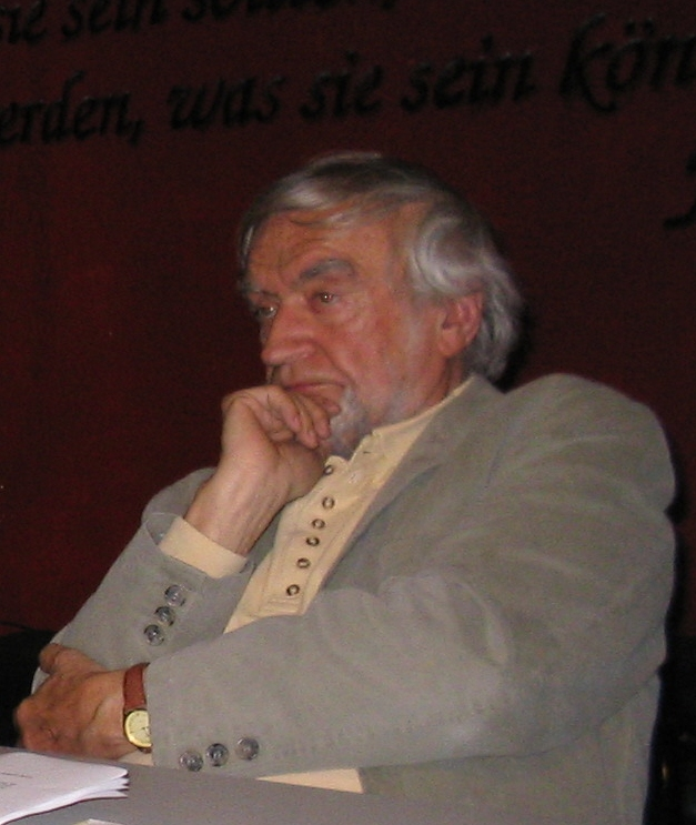 bei der Buchvorstellung von Götz Aly's Hitler-Apologie"Hitlers Volksstaat. Raub, Rassenkrieg und nationaler Sozialismus ist" am 23. Mai 2005 in Frankfurt am Main, Studentenhaus